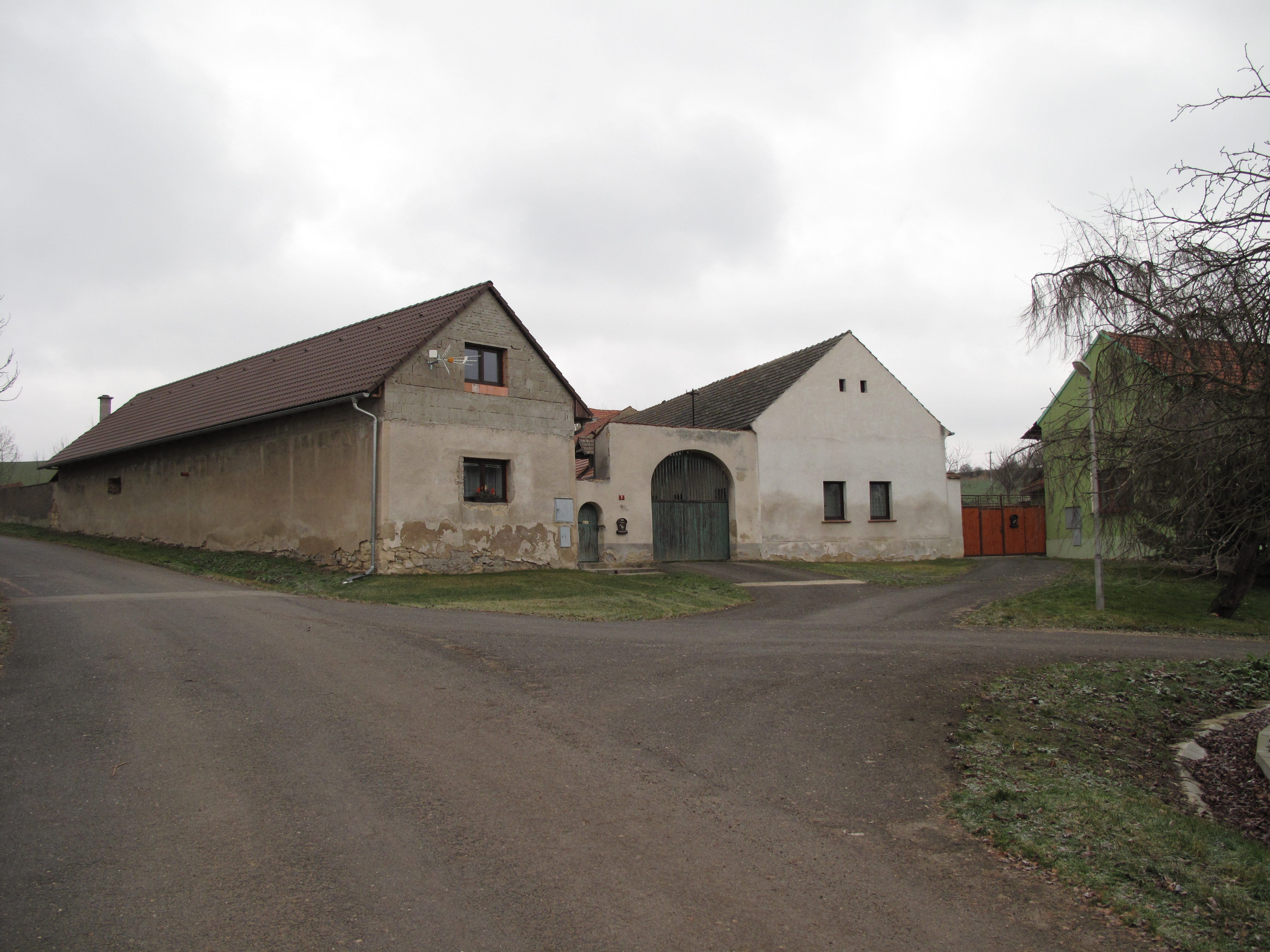 Náves v Semeči. Okres Litoměřice, Česká republika.